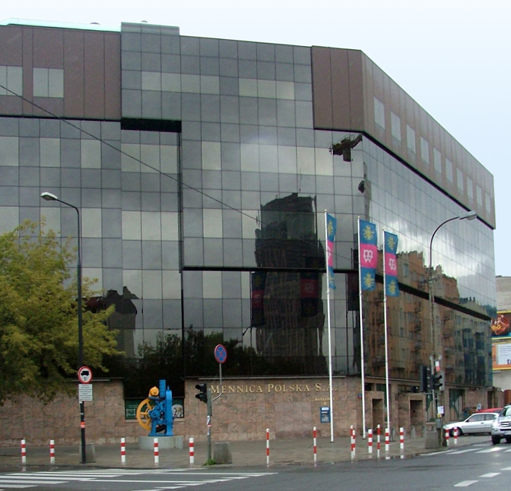 Poland, Żelazna Street in Warsaw, Mennica Polska